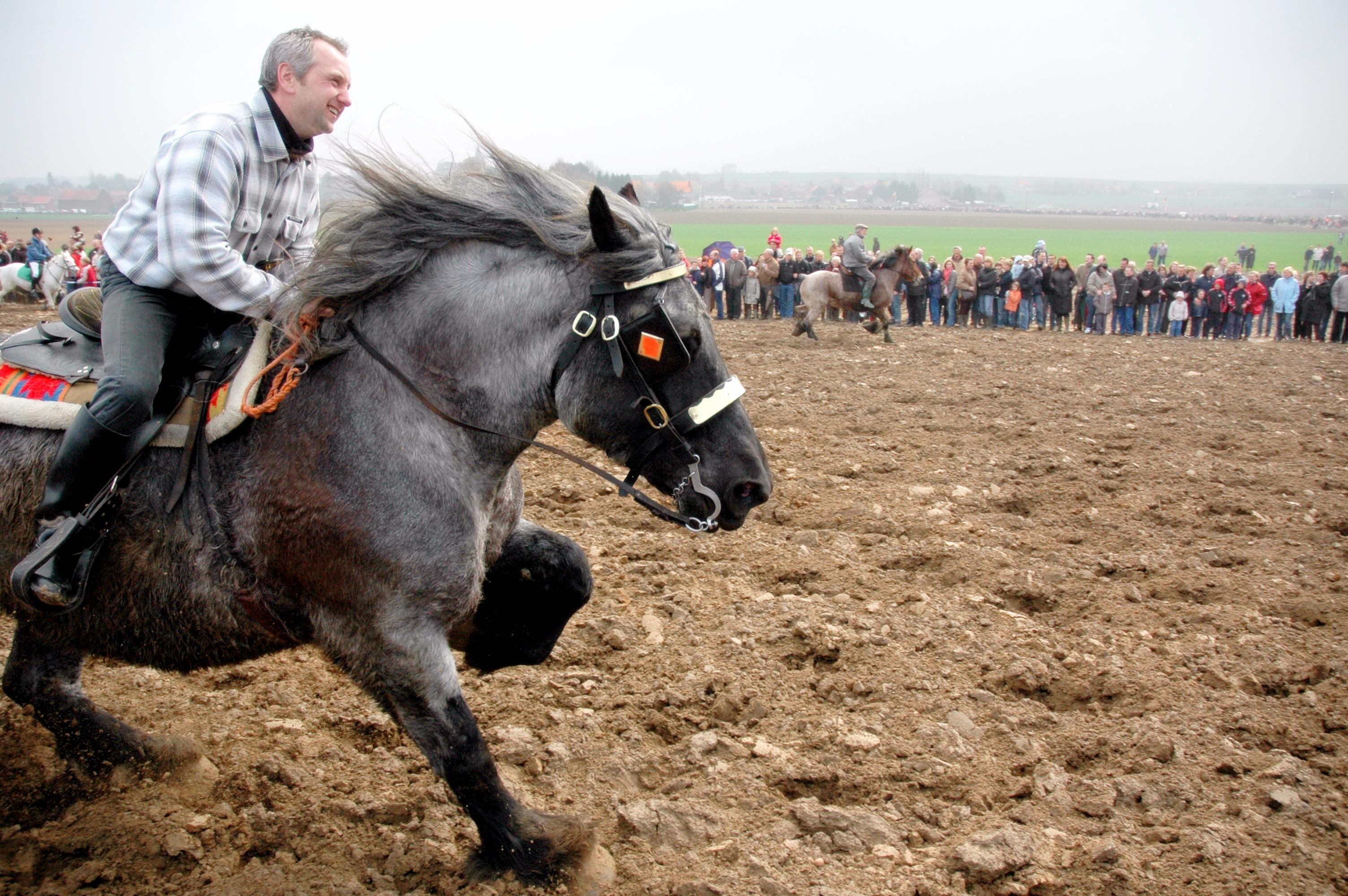 Een brabants paard aan het werk in de paardenprocessie van Hakendover op paasmaandag. Een evenement sinds 691